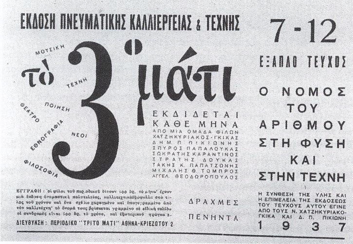 περιοδικό τρίτο μάτι